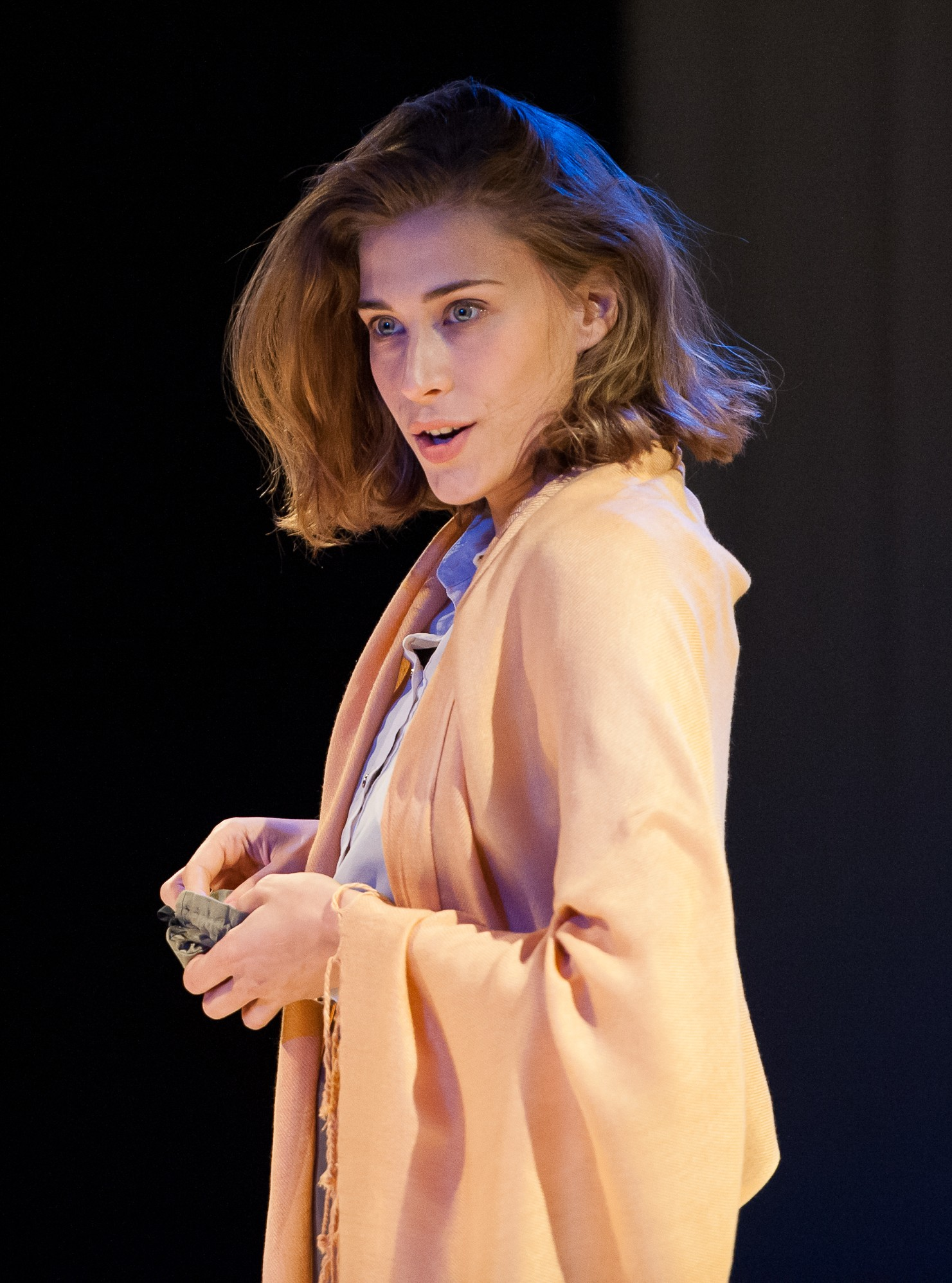 Más información en nuestra web Foto: Guillermo Casas - Festival de Almagro - 37 Edición - Un clásico, un regalo. ¿Cómo descargar correctamente las fotos? - ÁLBUMES Juicio a Don Juan Sobre versos de Tirso de Molina y Zorrilla Dirección: Didier Otaola Cía: Katum Teatro (Madrid) 16 julio D: 75min.